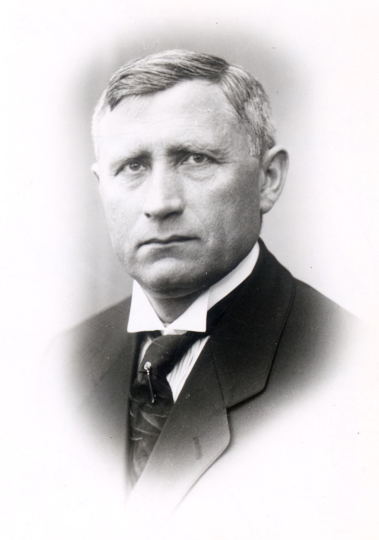 Norsk (bokmål): Stortingets portrett av Ivar Kirkeby-Garstad.